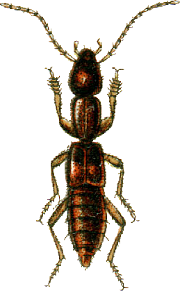 This file has been extracted from another file: Jacobs14.jpg